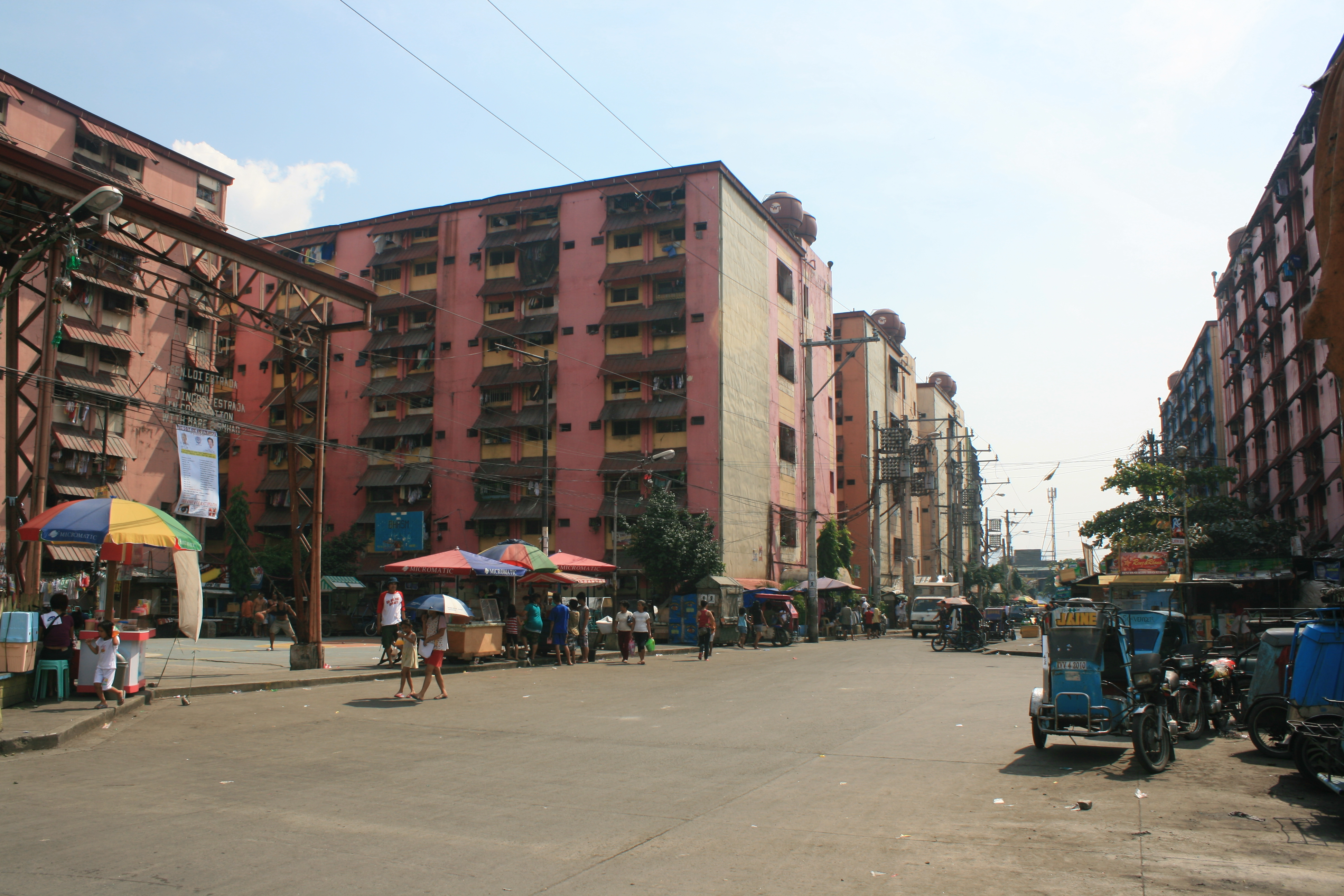 Smokey Mountain in Manila, Philippines